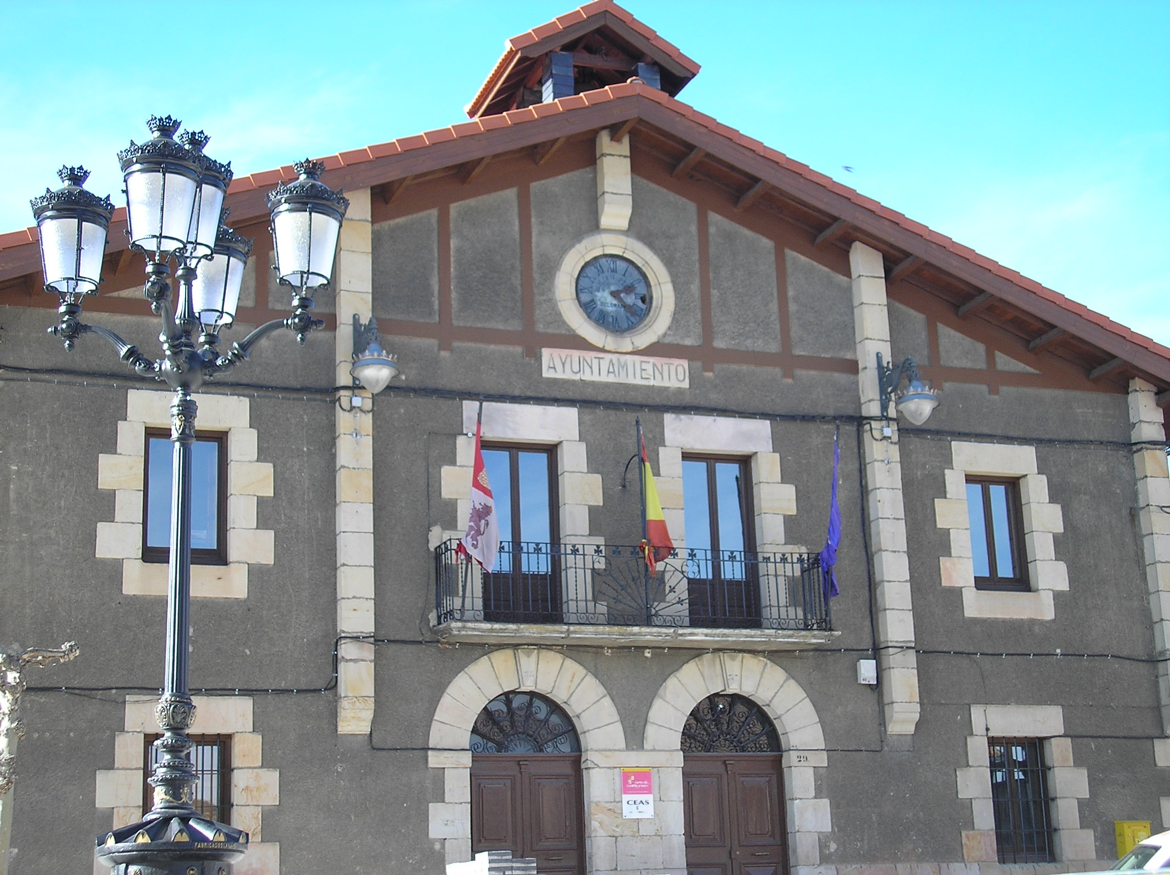 Ayuntamiento de Navaleno Taken by Valdoria